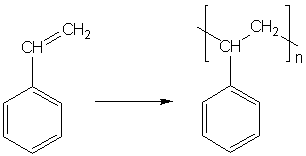 Confirmo que el gráfico fue creado para Wikipedia, a la que cedo todos los derechos. Untrozo 12:18 15 may, 2005 (CEST)